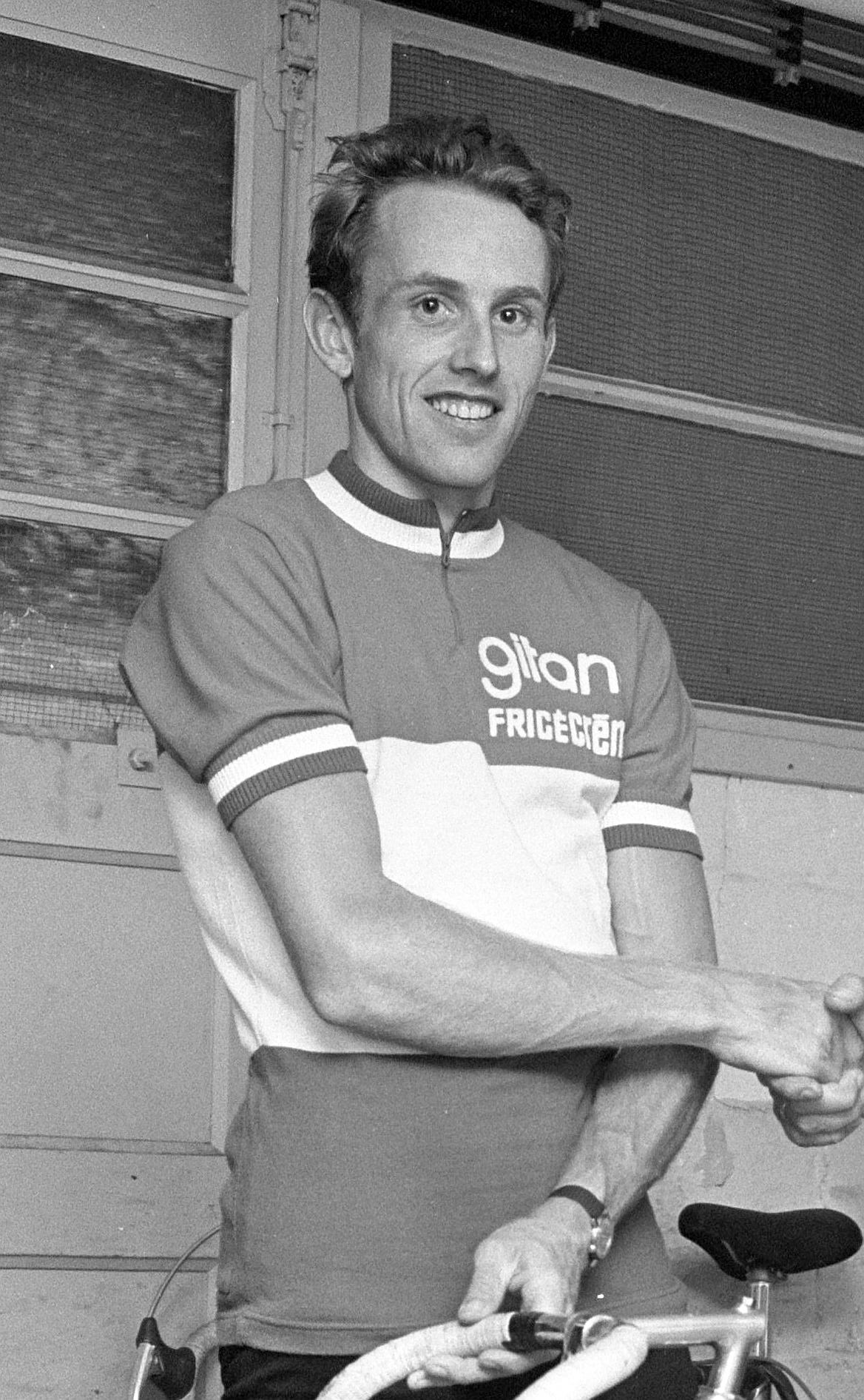 Nationaal Archief Beschrijving: Joop Zoetemelk Datum: 2 augustus 1973 Bestanddeelnummer 926-5866 Vervaardiger: Anefo / Verhoeff, Bert URL: Voor meer informatie over het Nationaal Archief: Voor meer foto's uit deze en andere collecties, bezoek onze Beeldbank:, U kunt ons helpen onze kennis van de fotocollecties te verrijken door tags en commentaren toe te voegen. Herkent u mensen of locaties of heeft u een bijzonder verhaal te vertellen bij één van de foto's, laat dan een reactie achter (als u ingelogd bent bij Flickr) of stuur een mailtje naar